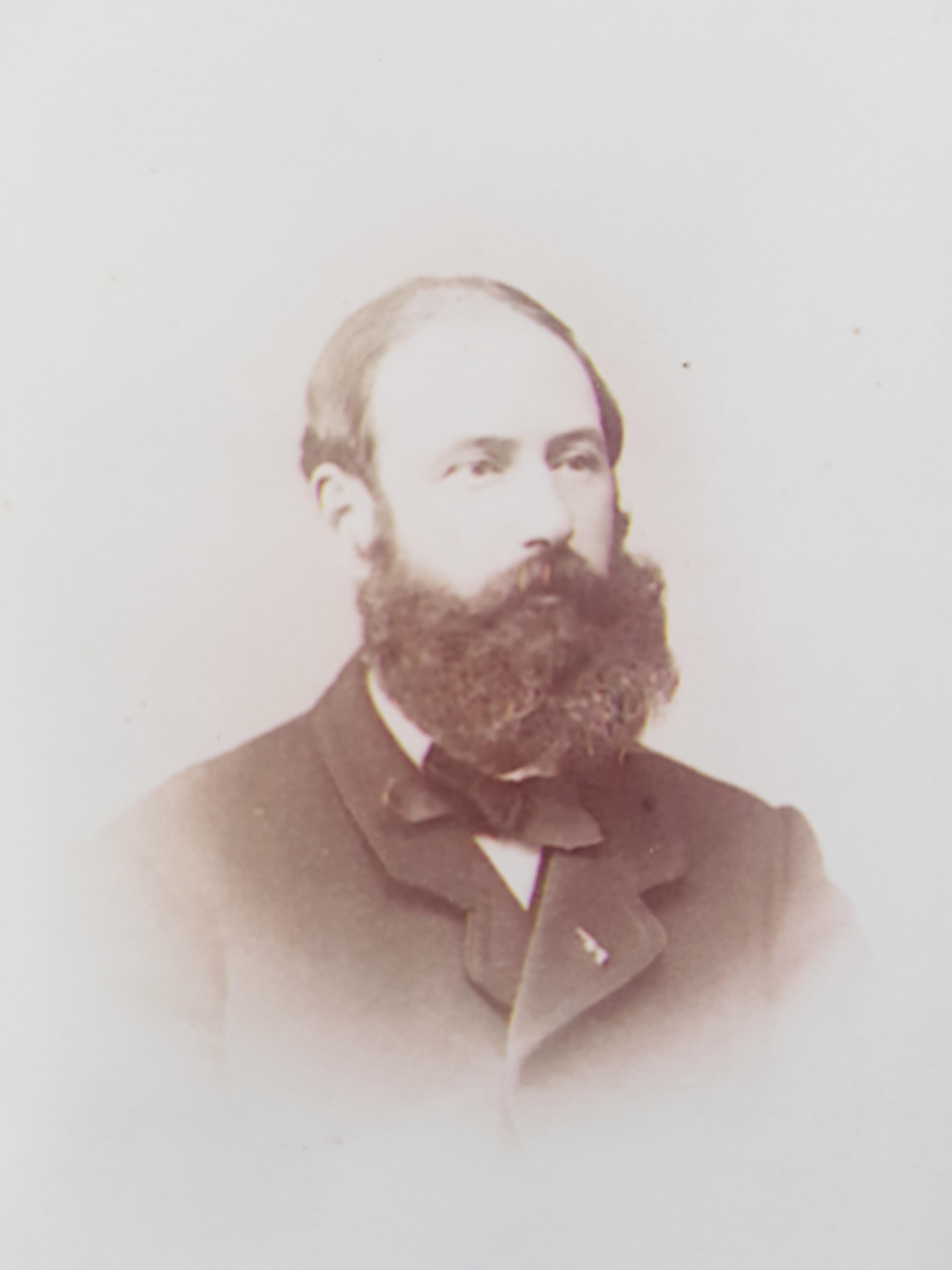 Photo d'Arthur Saguez de Breuvery